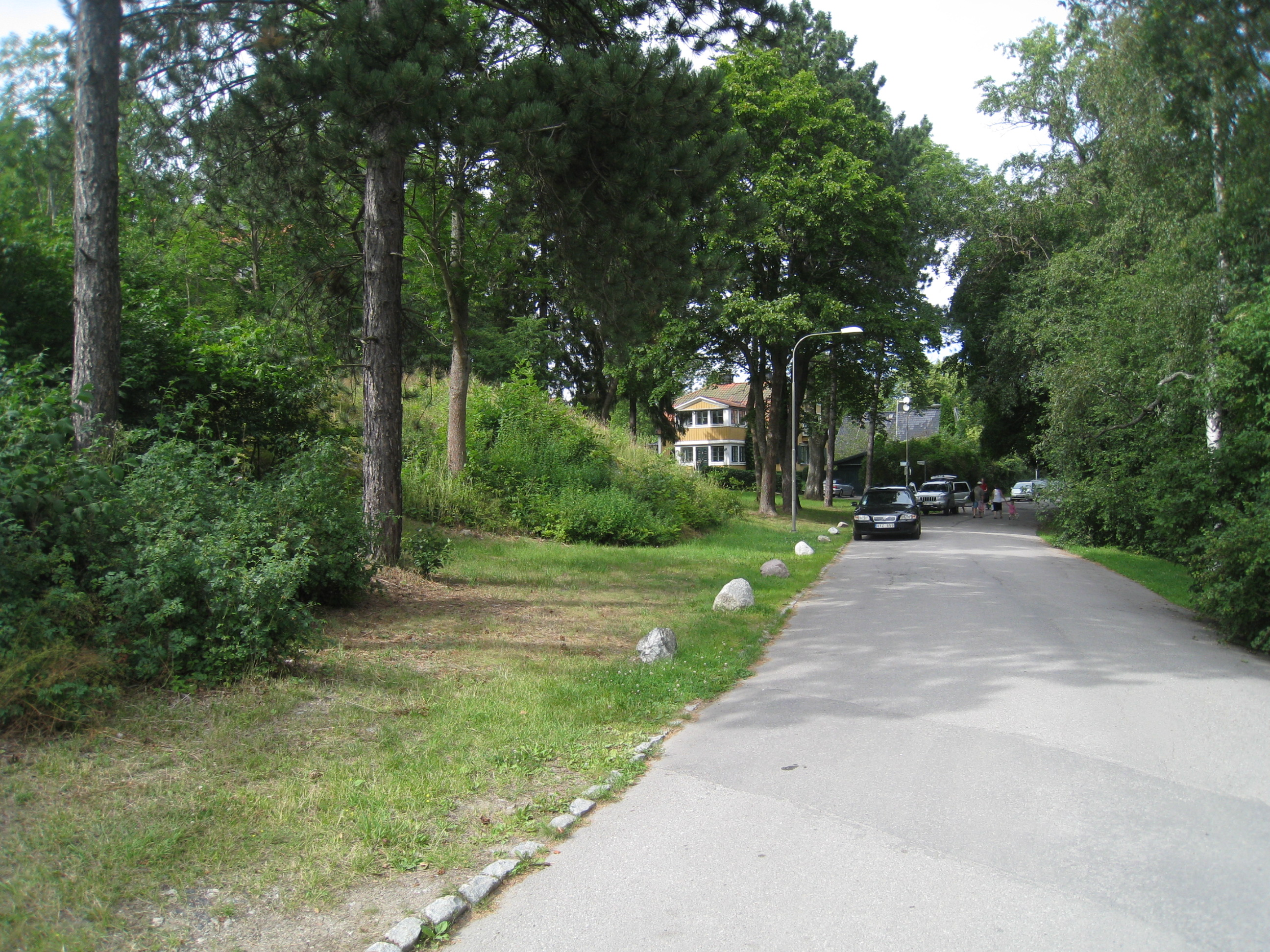 Per Albins Väg i Ålsten i södra Bromma. Vägen är uppkallad efter statsminister Per Albin Hansson (1885-1946), som i många år var bosatt i ett radhus på Ålstensgatan. Vägen gränsar till Ålstensängen.